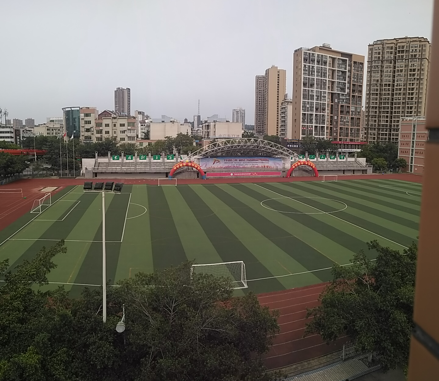 中文（中国大陆）: 德阳五中旌湖校区